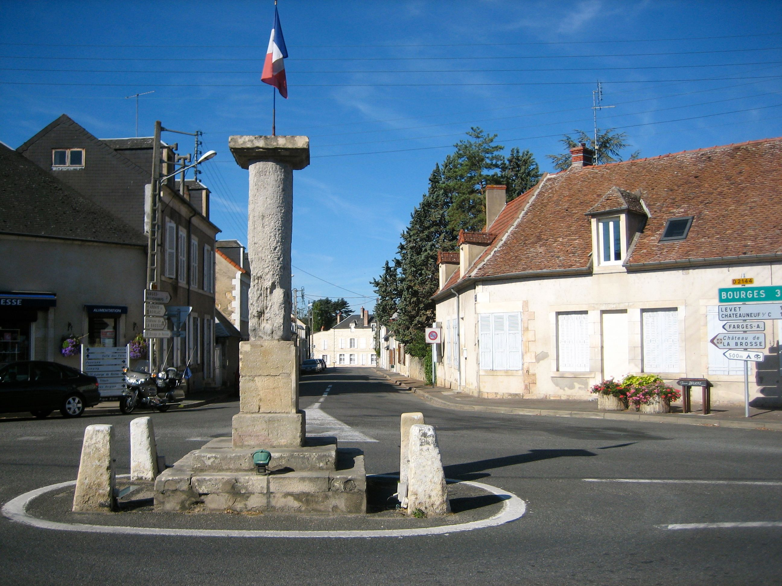 Bruère-Allichamps Borne Milliaire, sur la route départementale D2144 de Bourges à Montluçon